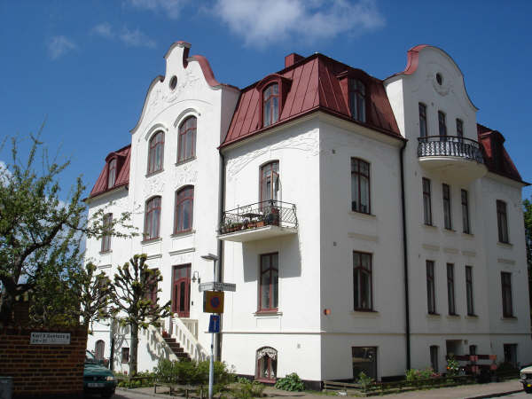 House in Helsingborg